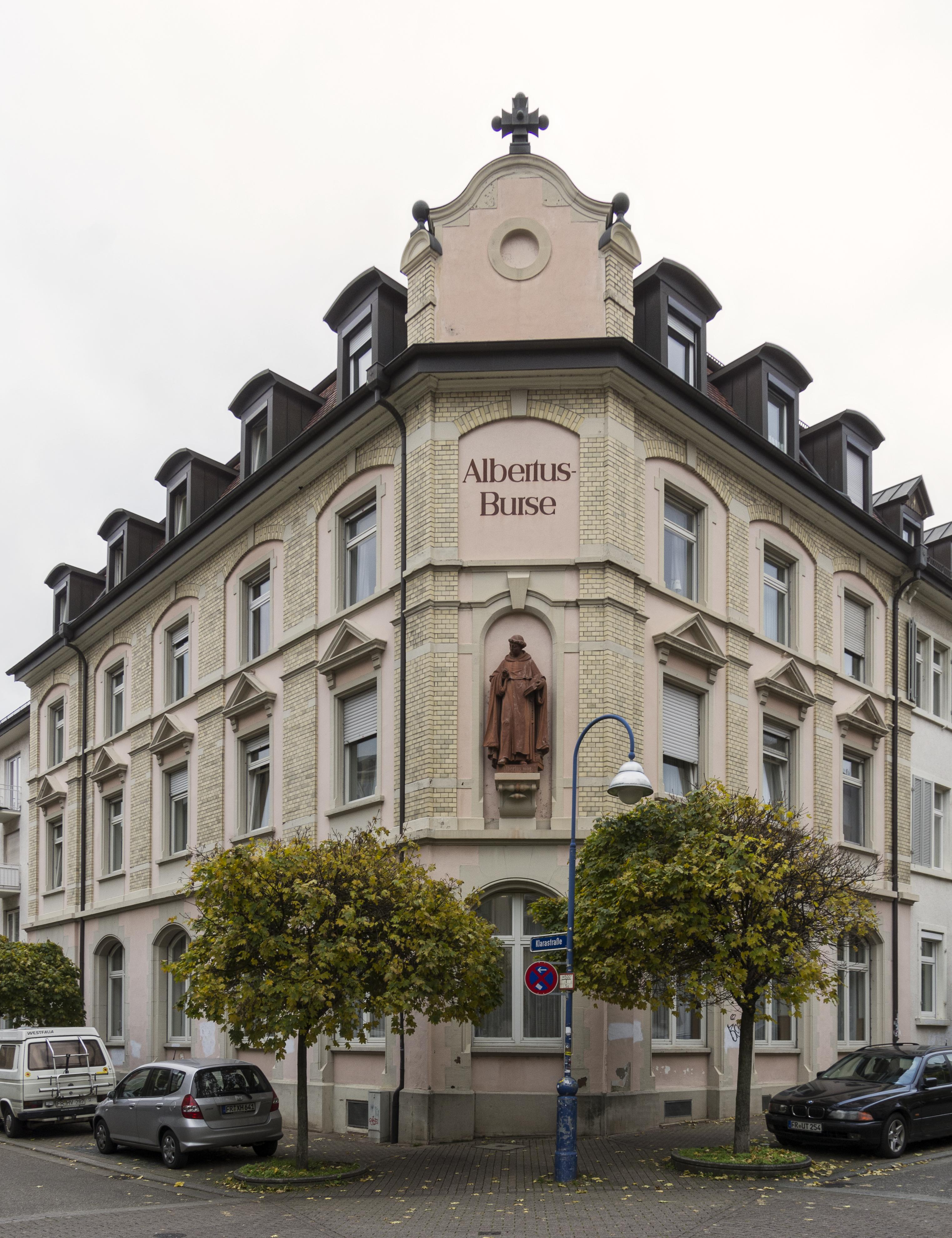 Gebäude in Freiburg im Breisgau